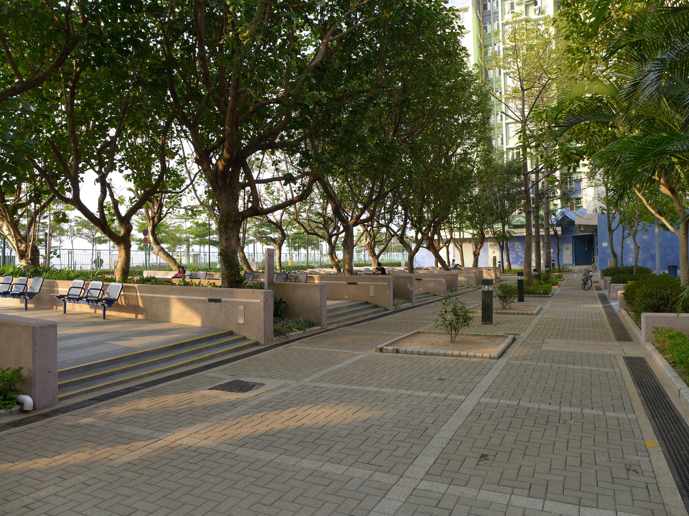 Kam Fung Court Landscape Garden